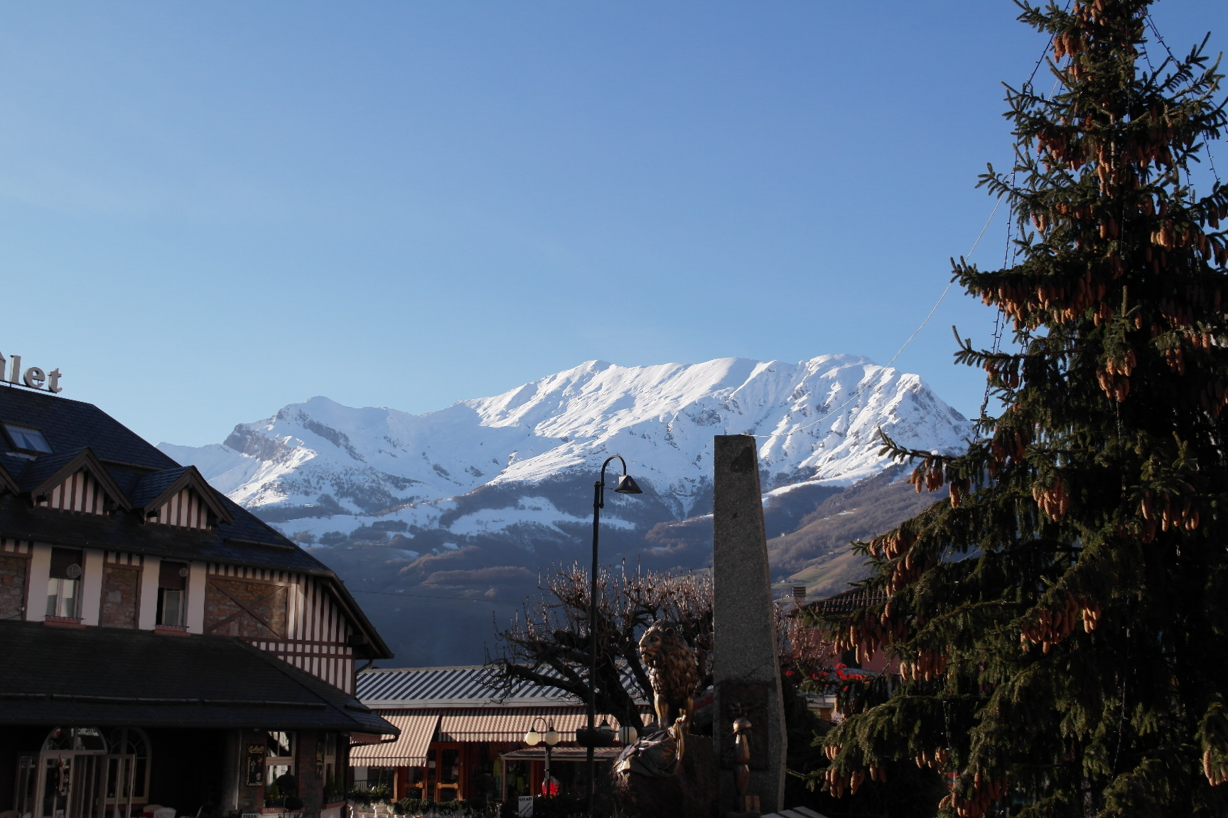 Monumento ai Caduti di tutte le Guerre protetto dalla Grigna This is a photo of a monument which is part of cultural heritage of Italy.